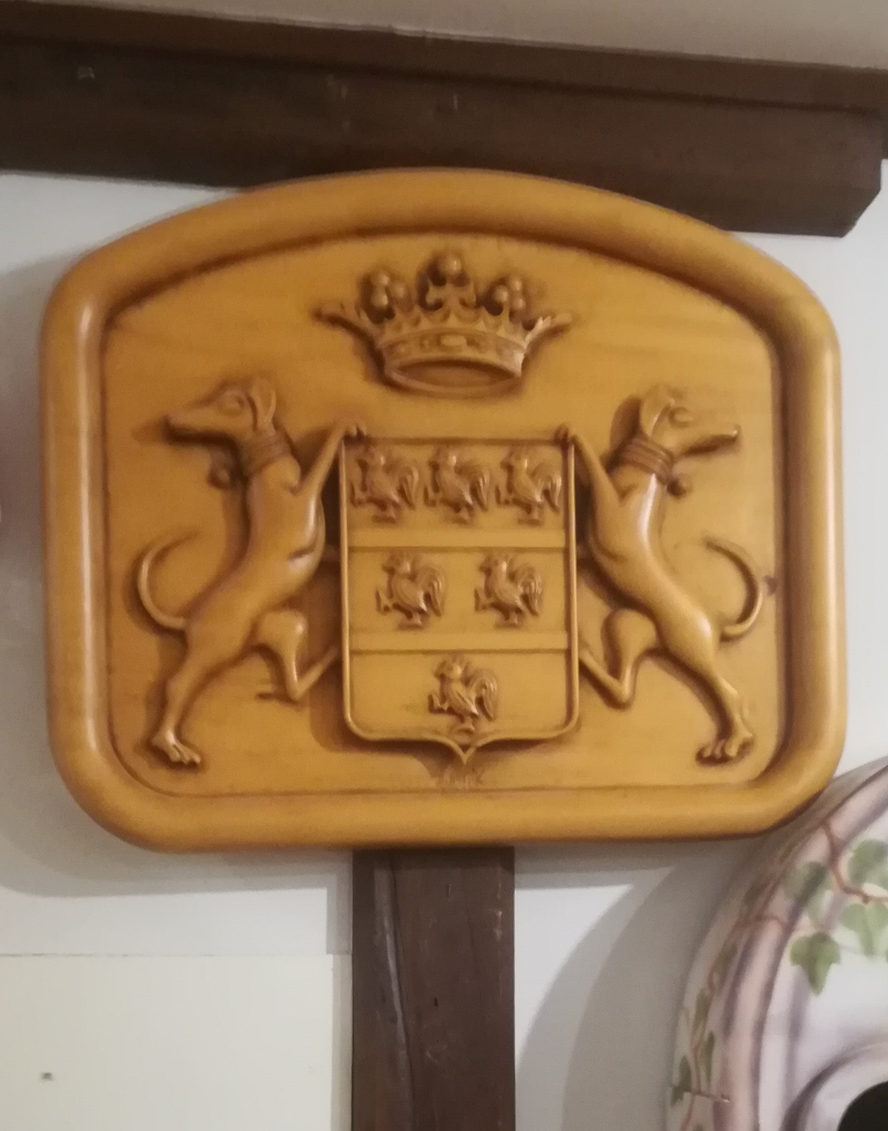 Représentation du blason de la famille d'Hautpoul, à la maison du bois et du jouet (Mazamet, Tarn)